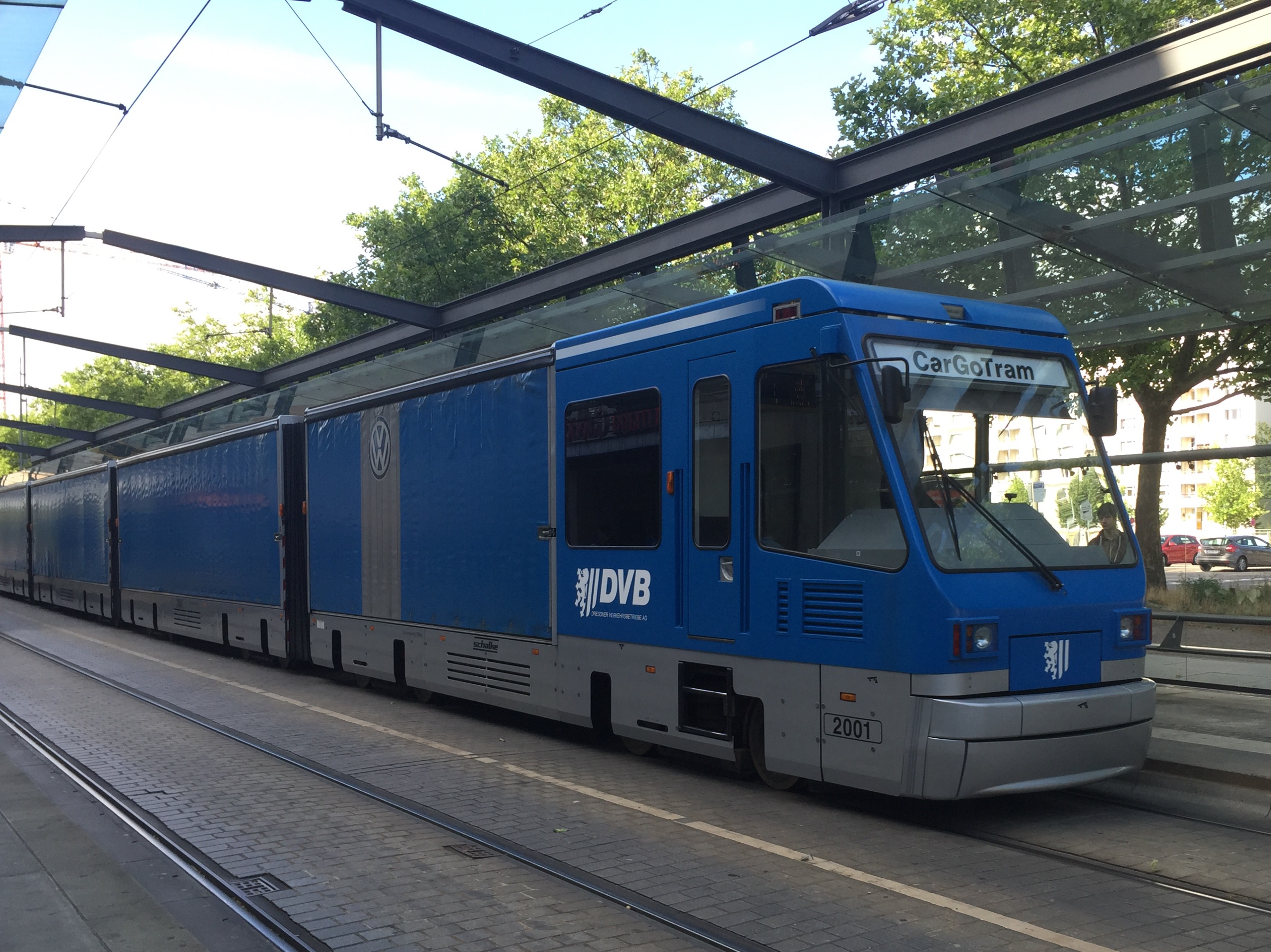 CarGo Tram Dresden Postplatz